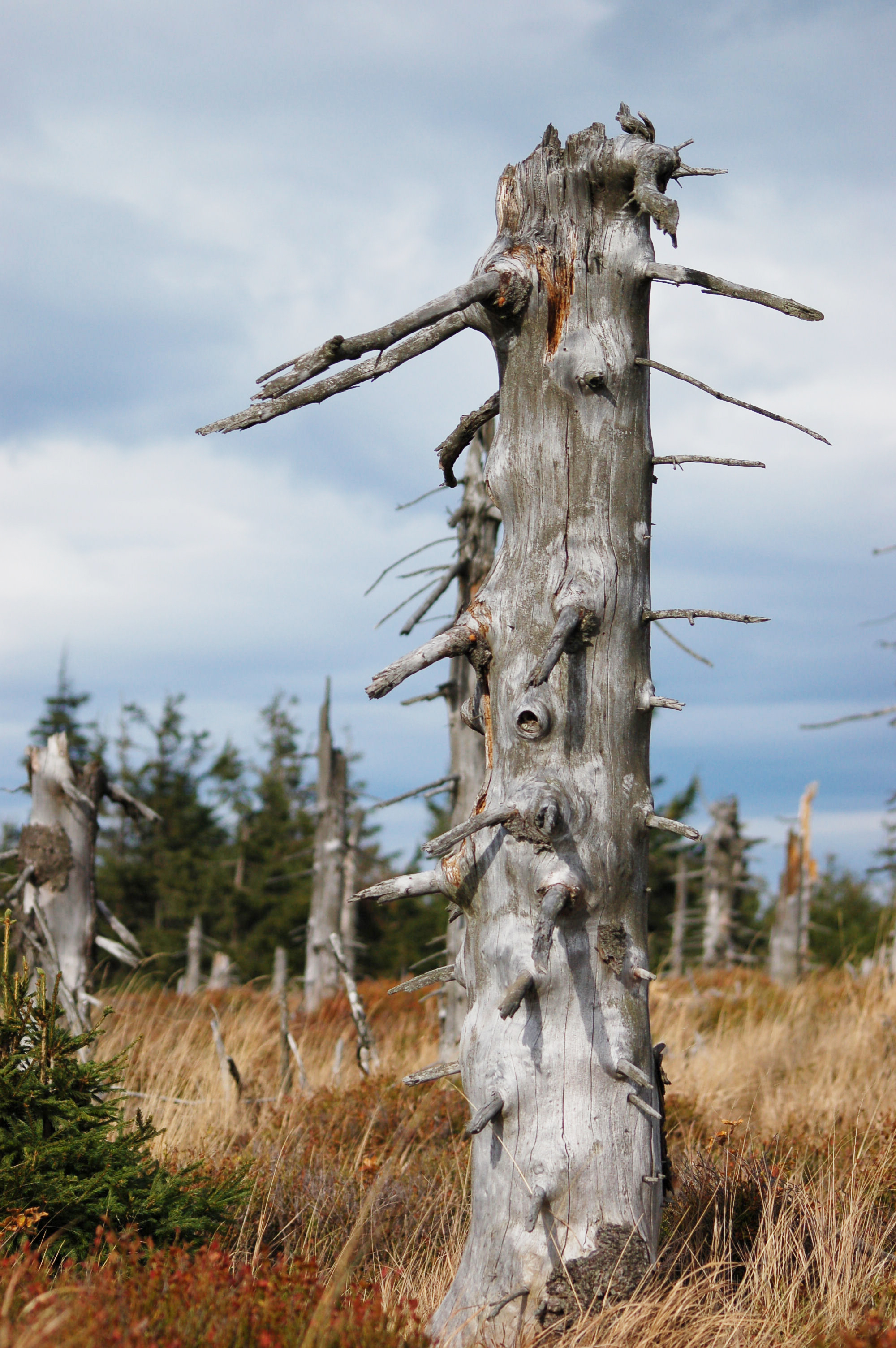 wiatrołom w Górach sowich